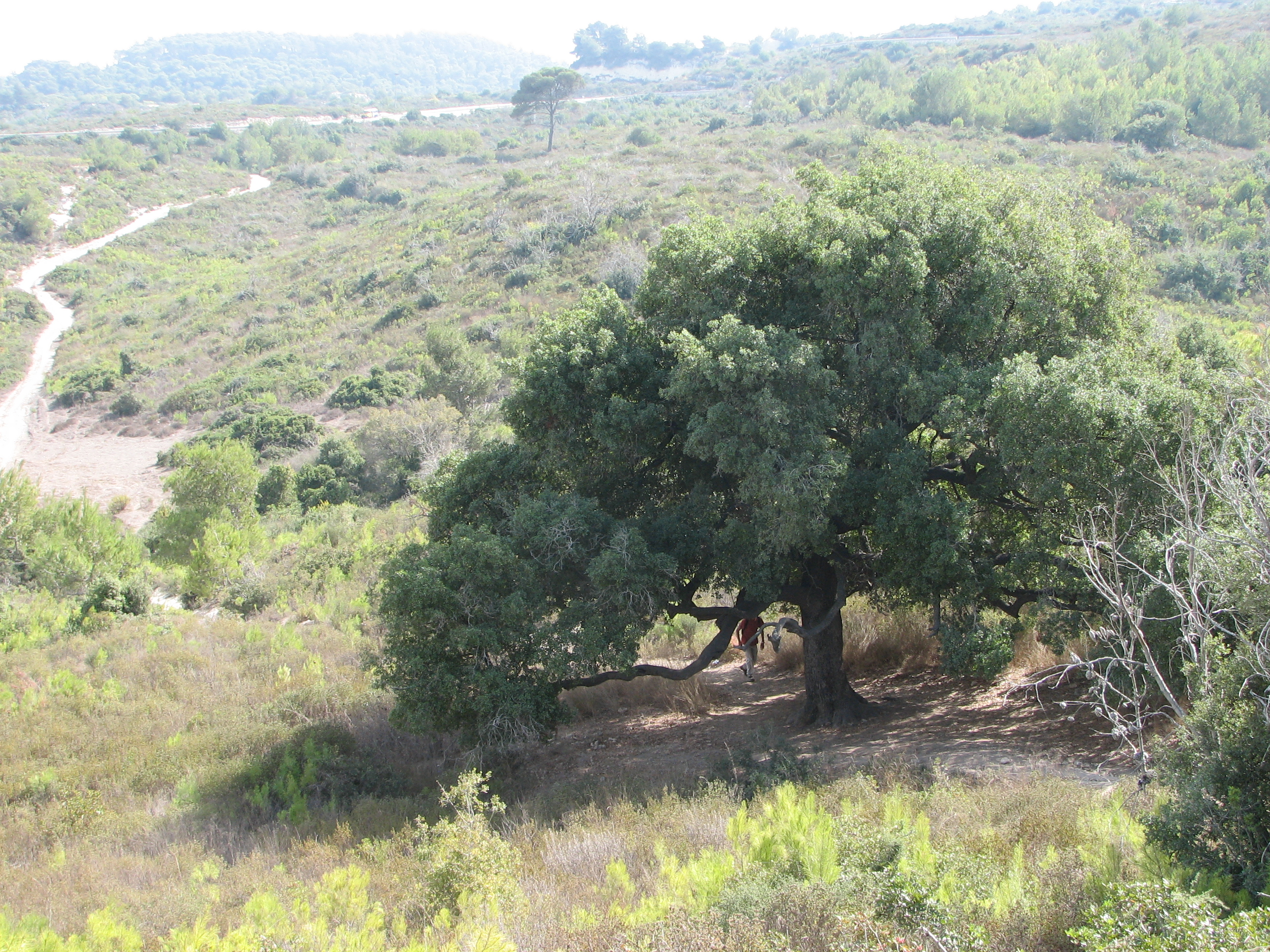 Old sacred trees of Quercus calliprinos at Shajarat Al Arba'in (Horshat Ha'arba'im), Mount Carmel, Israel, חורשת הארבעים (בערבית:סג'רת אלארבעין[1]) היא חורשת עצי אלון מצוי הנמצאת בפארק הכרמל, בשטח השיפוט של העיר נשר ממזרח לשטח אוניברסיטת חיפה ליד דרך הדורות. עץ אלון המזרחי ביותר בחורשה על רקע הר הכרמל